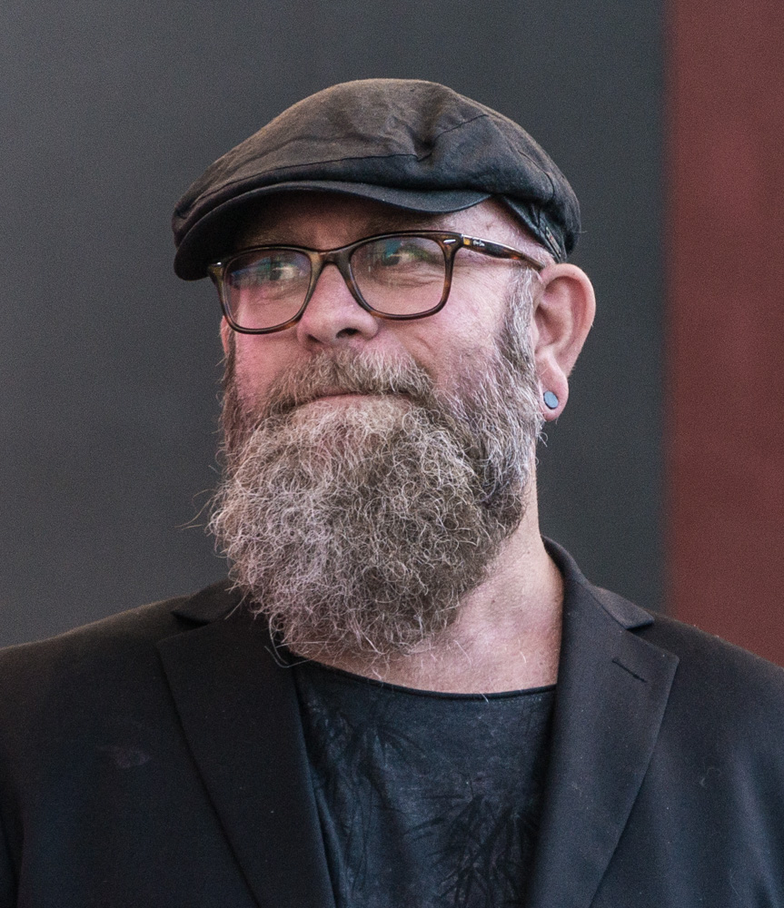 Fredrik Birging under RIX FM festivalen i Kungsträdgården i Stockholm den 24 augusti 2016.